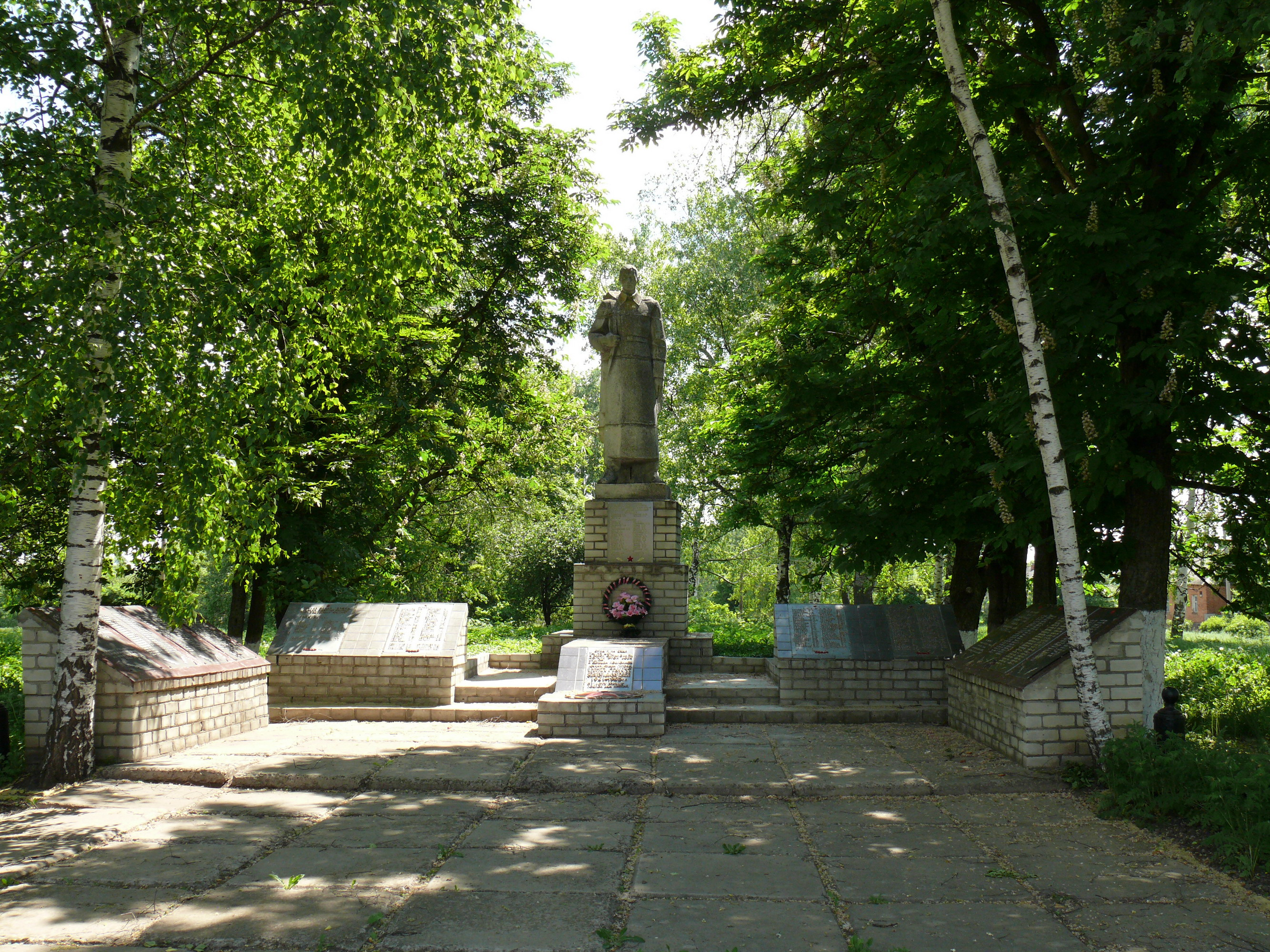 Мемориал погибшим воинам Великой Отечественной войны